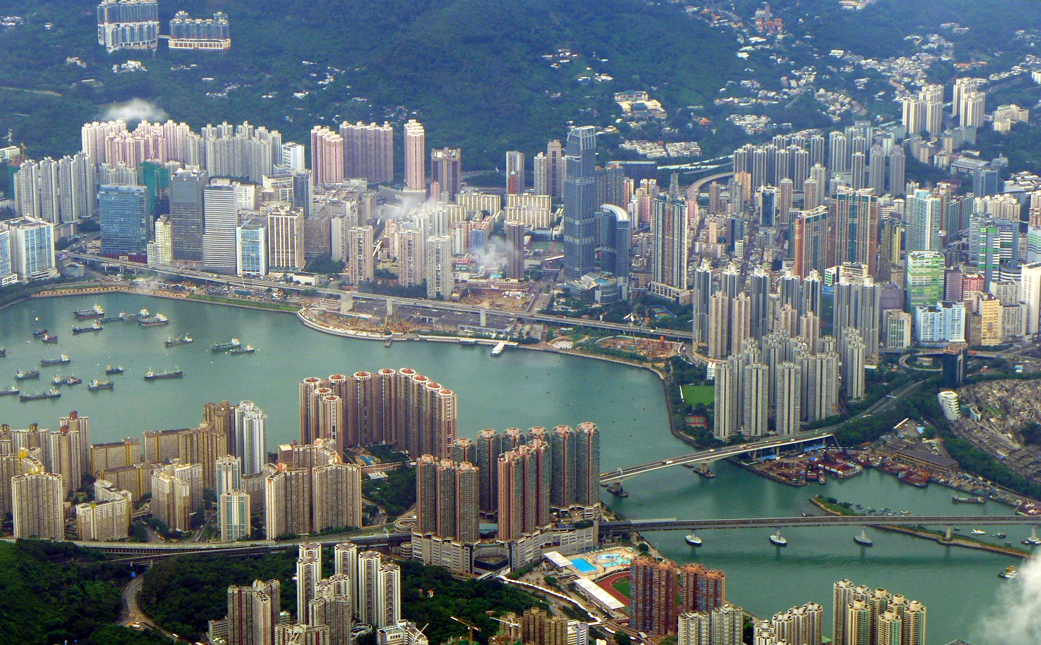 Tsuen Wan Overview